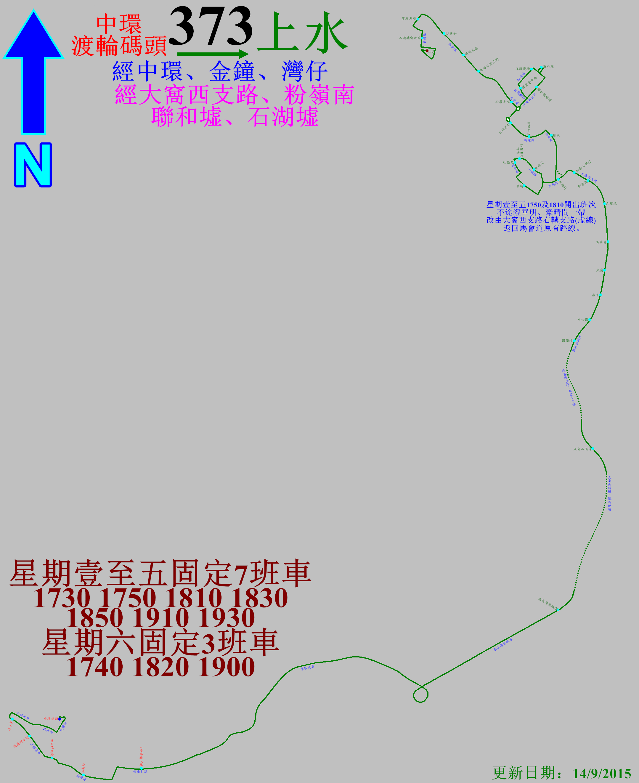 中文（香港）: 過海隧巴373上水方向的走線圖